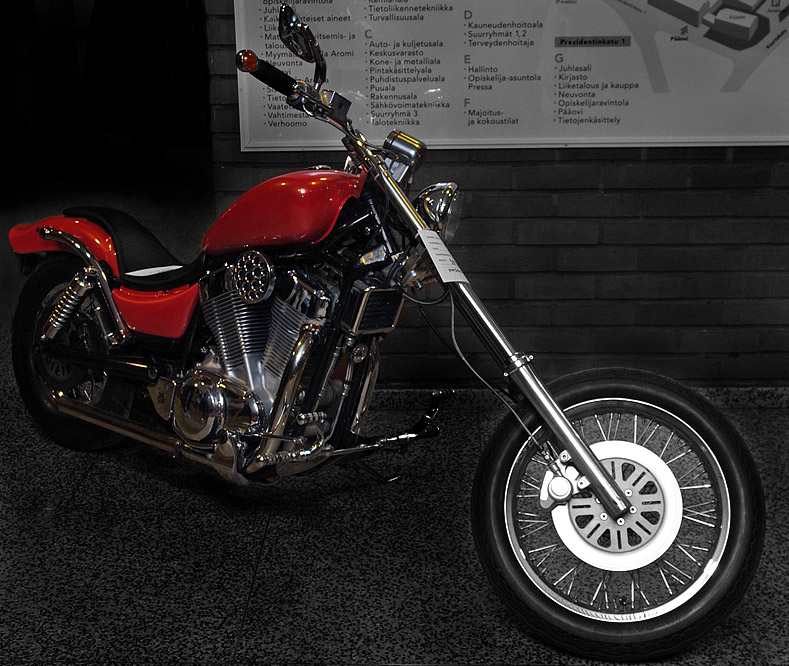 Suzuki Intruder 1400, a custom built motorcycle.